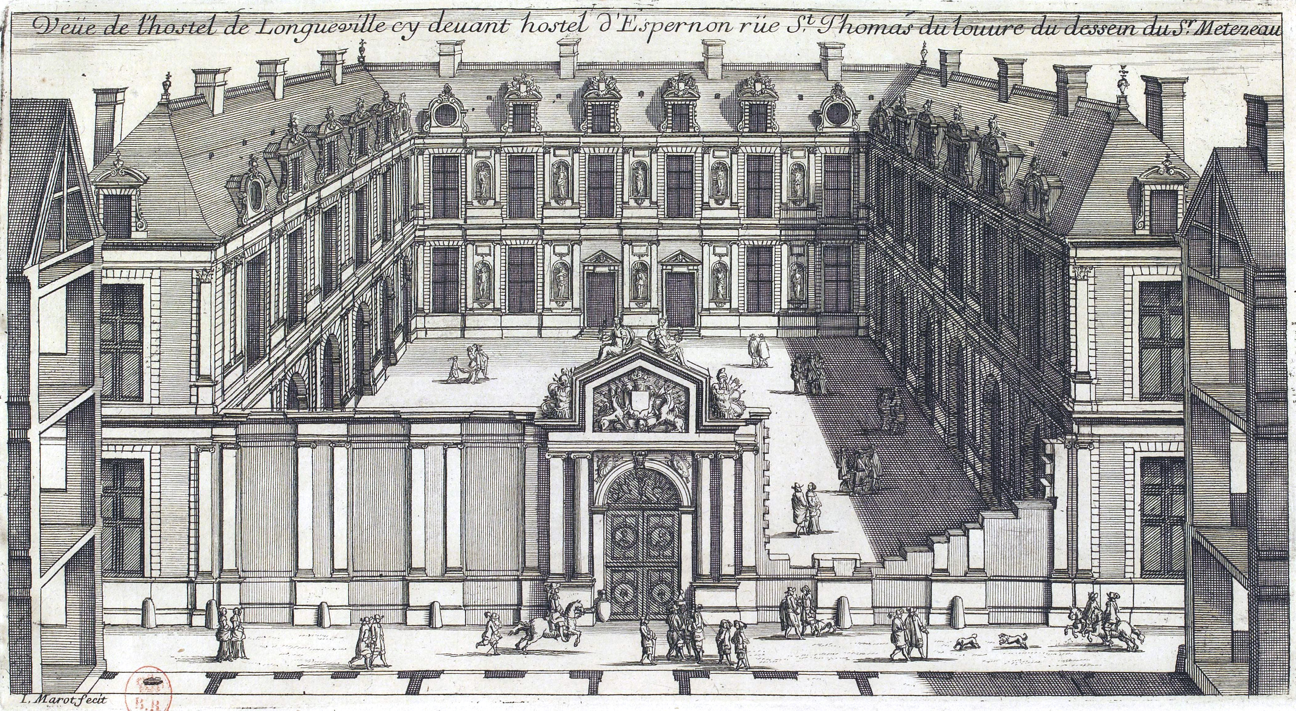 Plate from Jean Marot's L'Architecture française